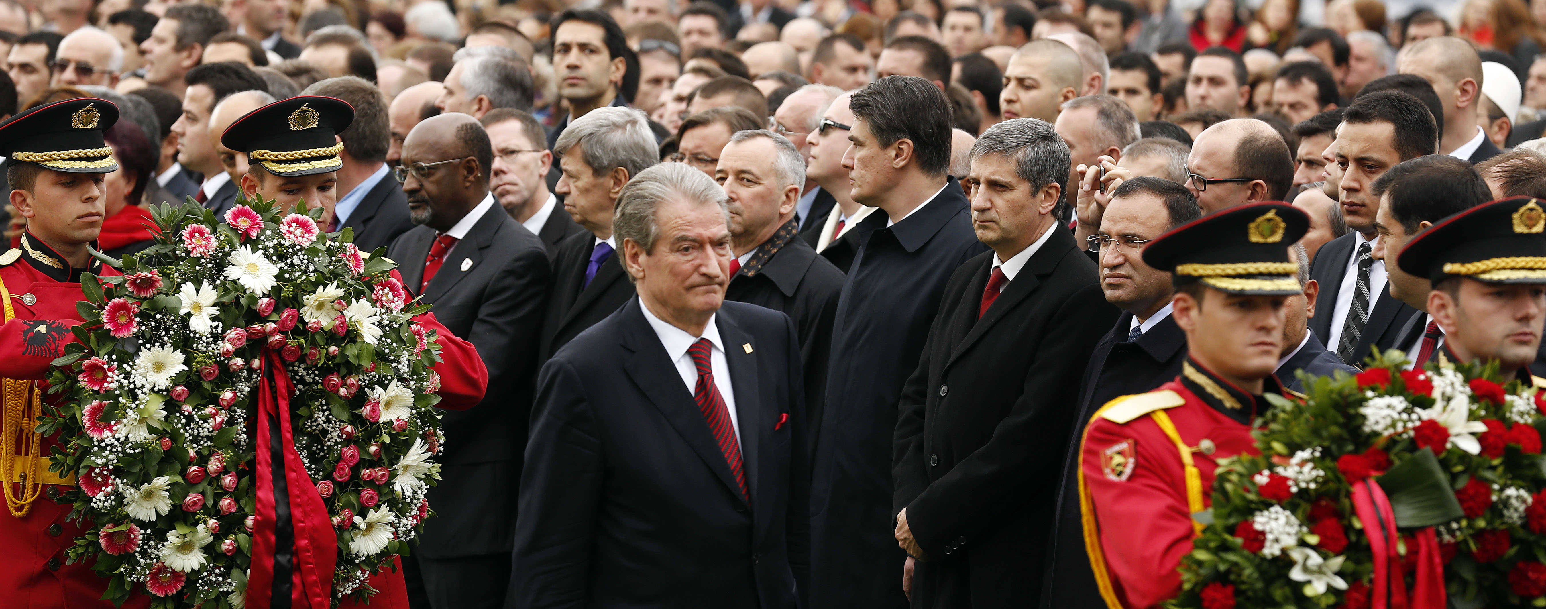 Feierlichkeiten Im Rahmen der 100 Jährigen Unabhängigkeit von Albanien, VK Michael Spindelegger, Sali Berisha, Tirana, Albanien, 28.11.2012, Foto: Dragan Tatic